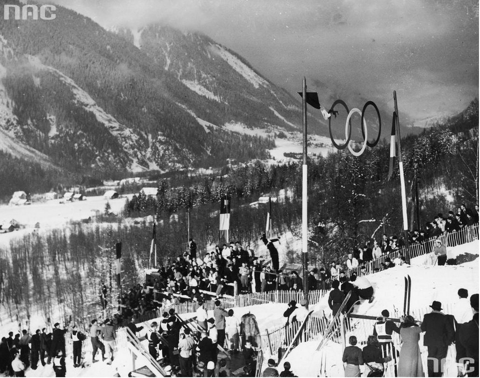 Le tremplin des Bossons lors des championnats du monde 1937